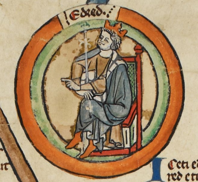 Miniature d'Eadred d'Angleterre dans une généalogie royale du XIVe siècle.